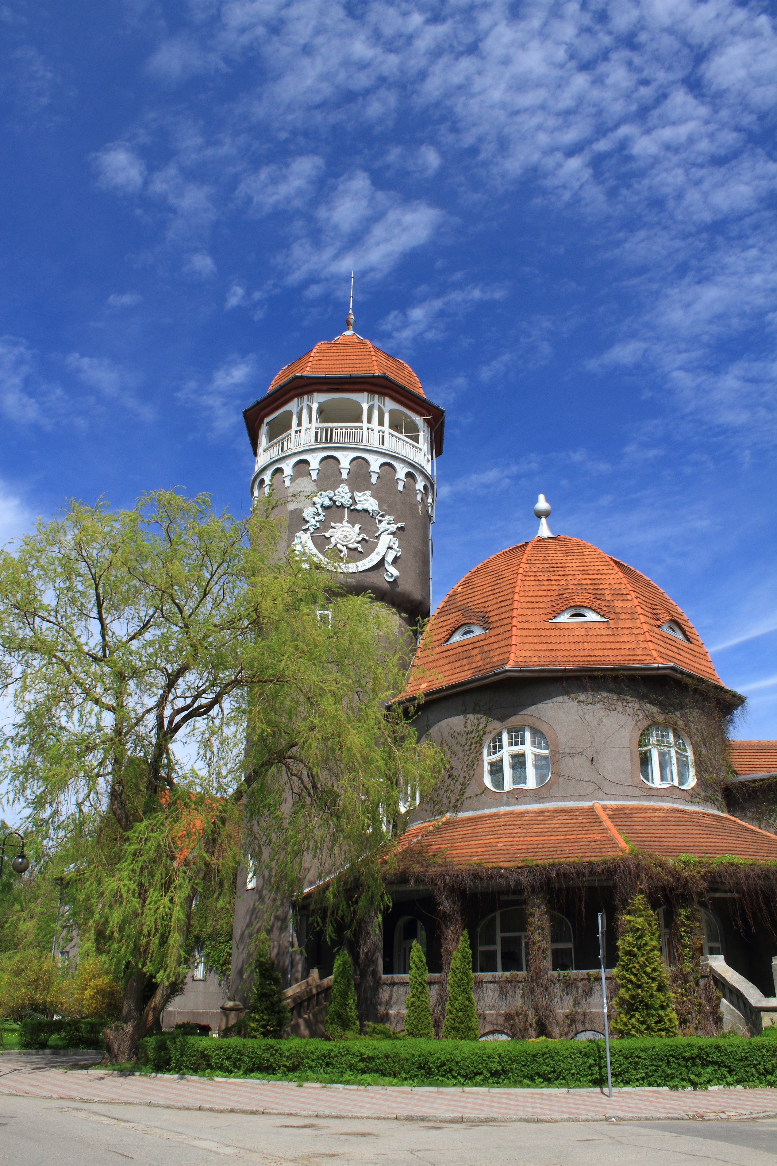 Wasserturm Rauschen Главной достопримечательностью и украшением города, его визитной карточкой является знаменитая башня морской водолечебницы высотой 25 метров. В 2008 году исполнилось 100 лет с момента завершения её строительства. С середины XIX по первую треть XX века в Восточной Пруссии было построено множество различных по архитектуре водонапорных башен, но башня в Раушене – самая красивая. Сооружена по проекту архитектора Отто- Вальтера Куккука в 1900-1908 годах. Здания водолечебницы с башней, построенные в романтическом стиле, стали центральным организующим объектом, доминантой верхней, дюнной части Раушена. . Башня, вокруг которой образовалась небольшая площадь, выполняла роль центра городской среды - ратуши. Морская водолечебница отвечала всем требованиям санаторно-курортного лечения того времени. Кроме тёплых морских и углекислых ванн, здесь можно было получить грязевое и электролечение, лечебный массаж. Для ванн вода в резервуар поступала по трубопроводу непосредственно из моря с помощью насоса, который находился у морских мостков. Под самой крышей башни имелась смотровая площадка, с которой открывался прекрасный вид на морские дали, на красные крыши городских вилл среди сосен и зелени. К сожалению, в последние годы площадка для туристов закрыта. В настоящее время башня с водолечебницей относится к СЦВС, и по прежнему является главной достопримечательностью Светлогорска. В 1978 году на башне установлены солнечные часы, которые органично вписались в облик здания. Автор солнечных часов - скульптор – монументалист Николай Фролов.